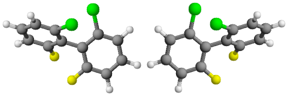 rappresentazione della stereogenicità nei bifenili disegnato da Paginazero Categoria:Immagini di chimica